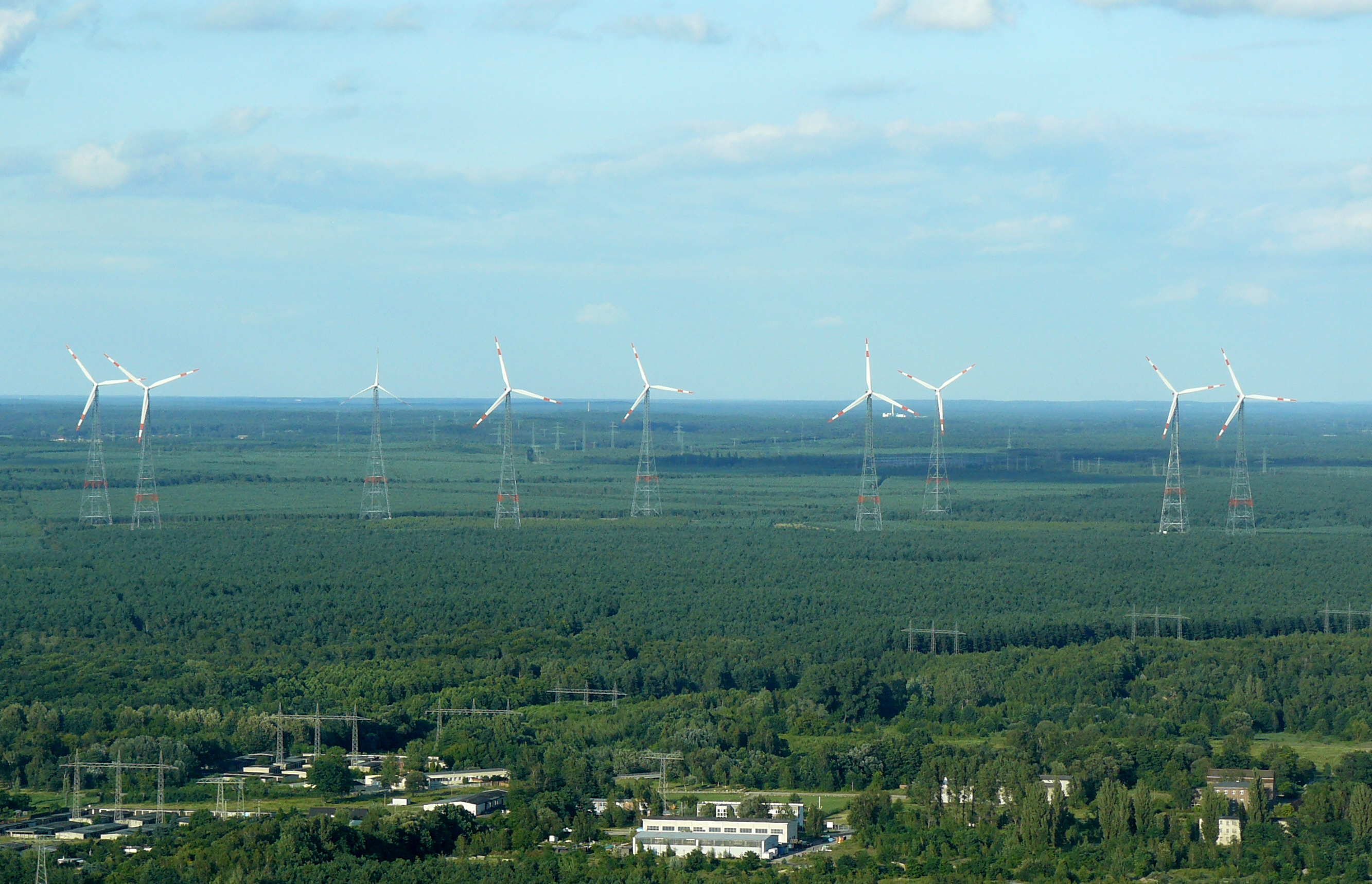 Windpark Spremberg vom Dach des Kraftwerk Schwarze Pumpe aus gesehen